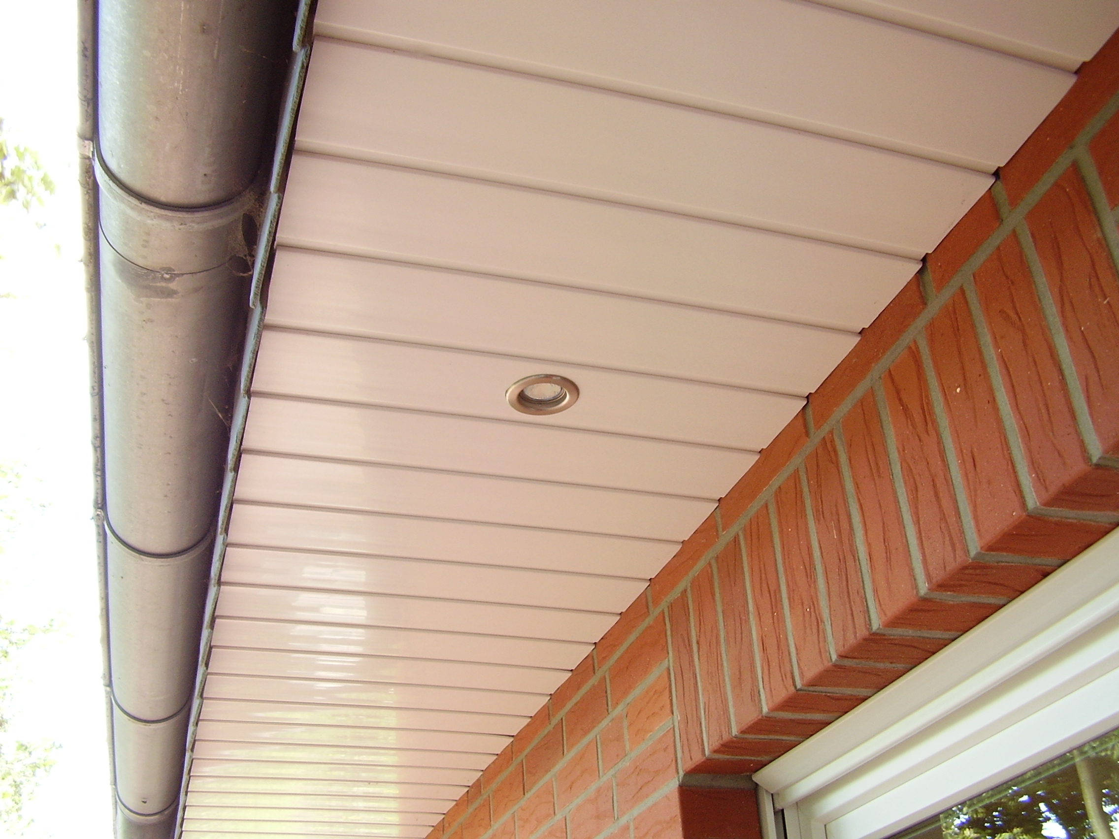 Dachkasten roof, house